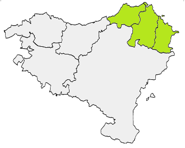 Iparraldeko mapa Euskal Herrian.